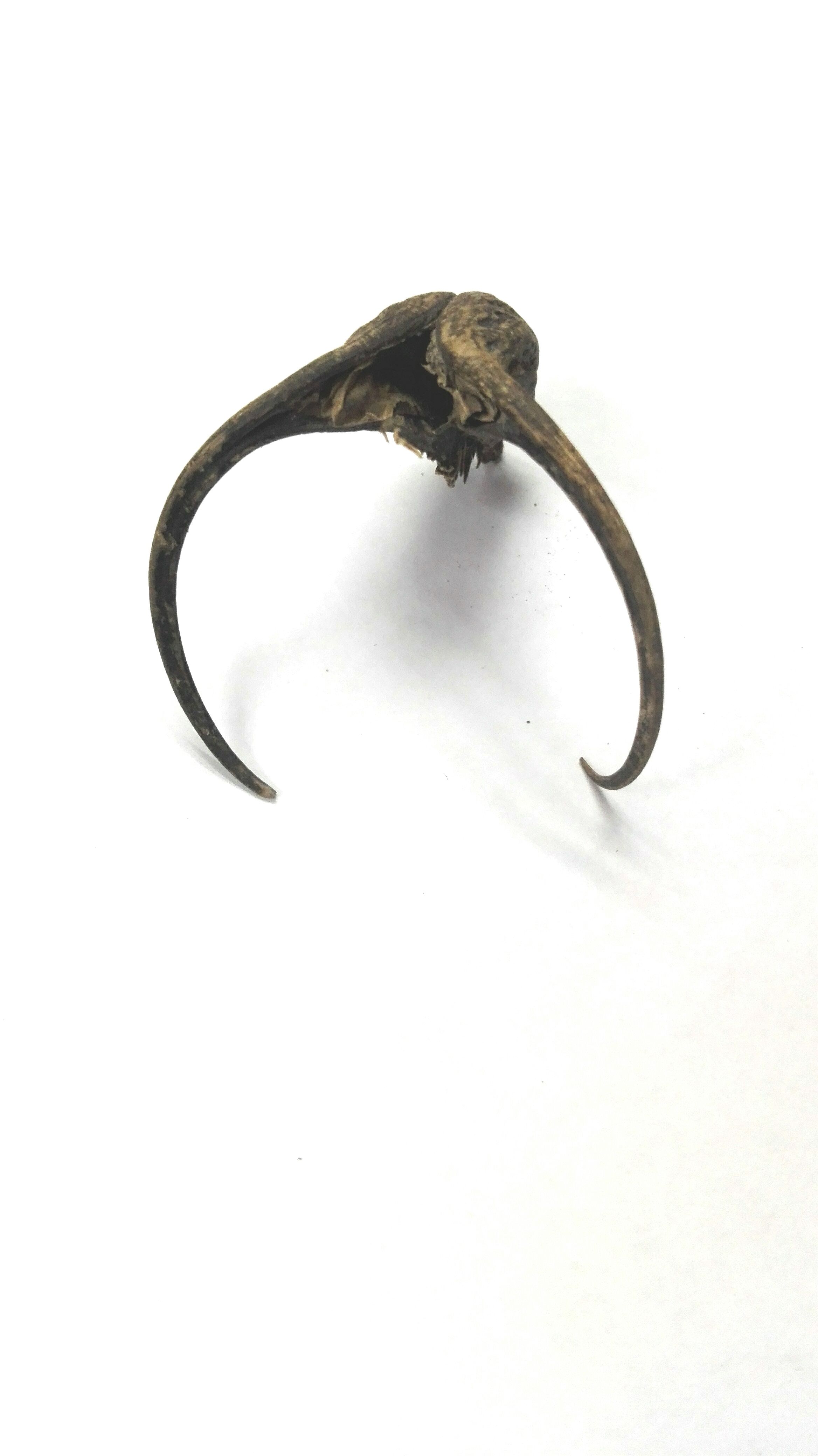 Semilla seca con puntas alusivas a unos cuernos